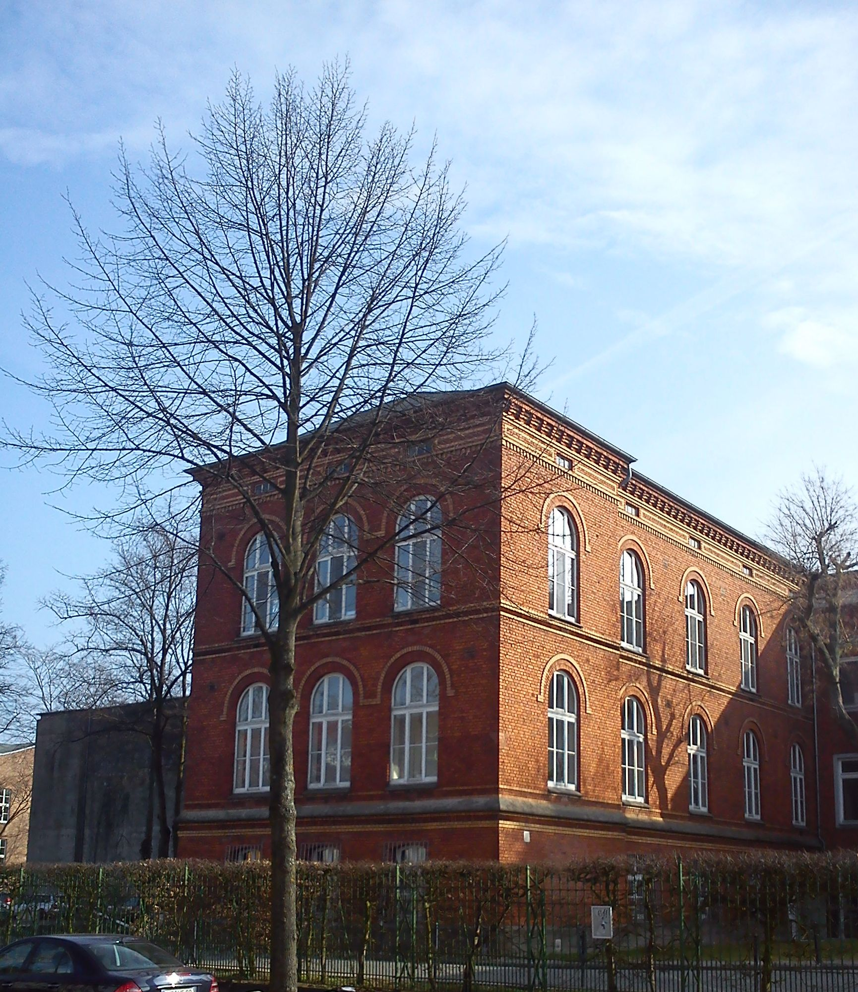 Altes Gebäude an der St.-Jürgen-Straße nahe Friesenstraße